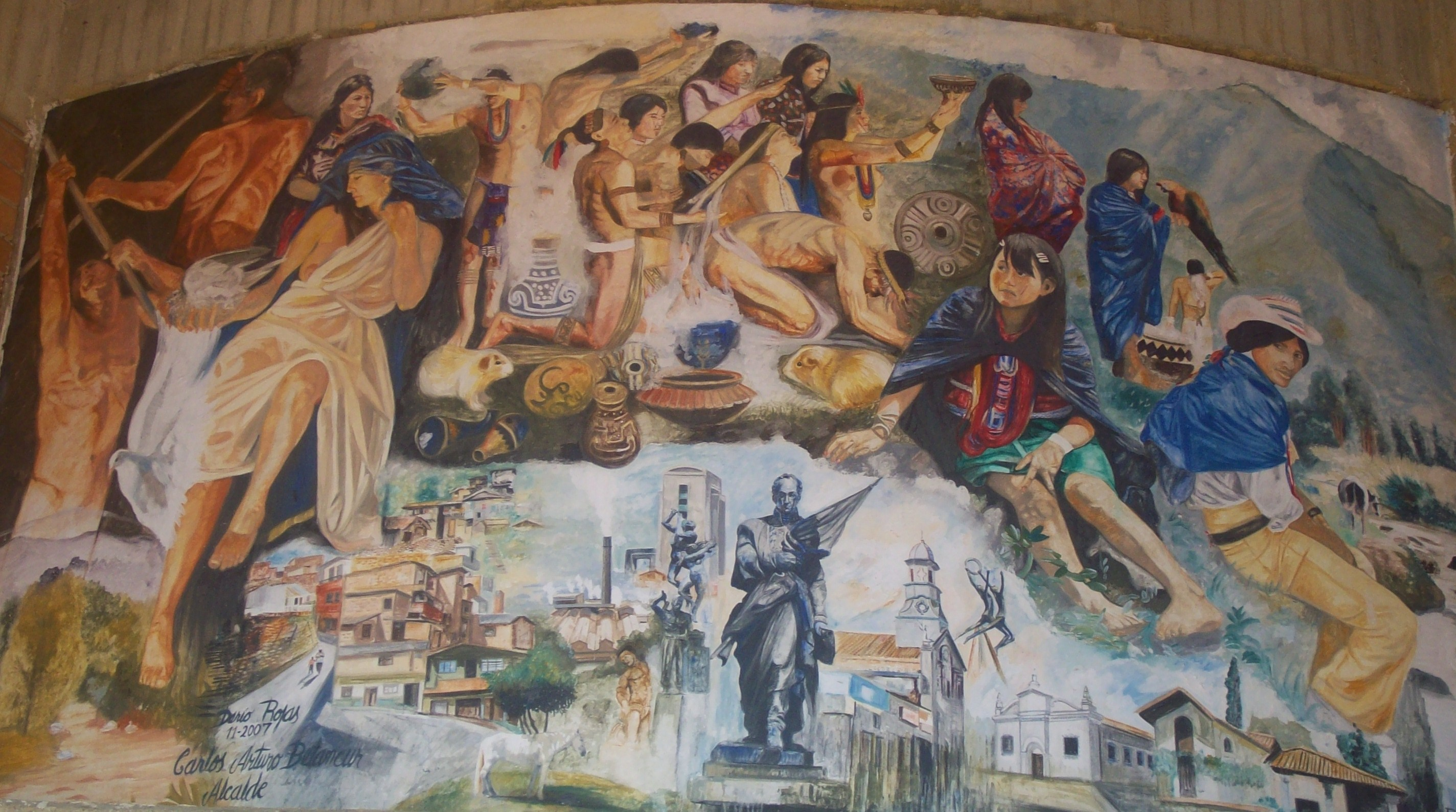 Fragmentos indígenas (2007), obra de Darío Rojas en el Centro Administrativo Municipal de Itagüí